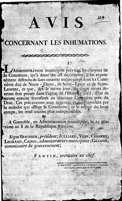 Avis d'ouverture, daté du 14 février 1800, du nouveau cimetière du Drac à Grenoble à compter du 17 février 1800.